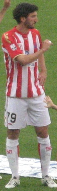 Squadra del Vicenza Calcio. Da sinistra: Gatton Gattoni, Alex Pinardi, Stefano Botta, Evans Soligo, Pasquale Maiorino, Nicholas Giani, Elvis Abbruscato, Nicolò Brighenti, Marco Pisano, Davide Gavazzi e Alberto Frison.